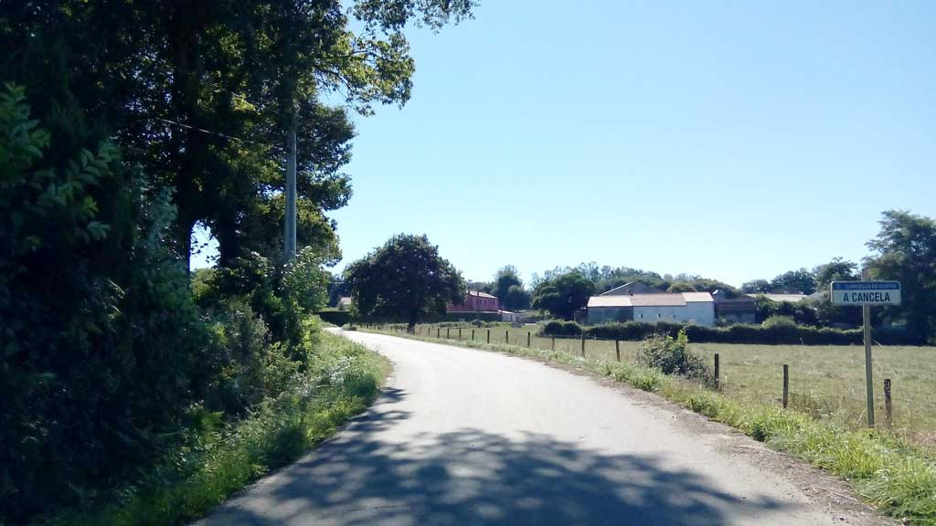 Vista da Cancela, Curtis.